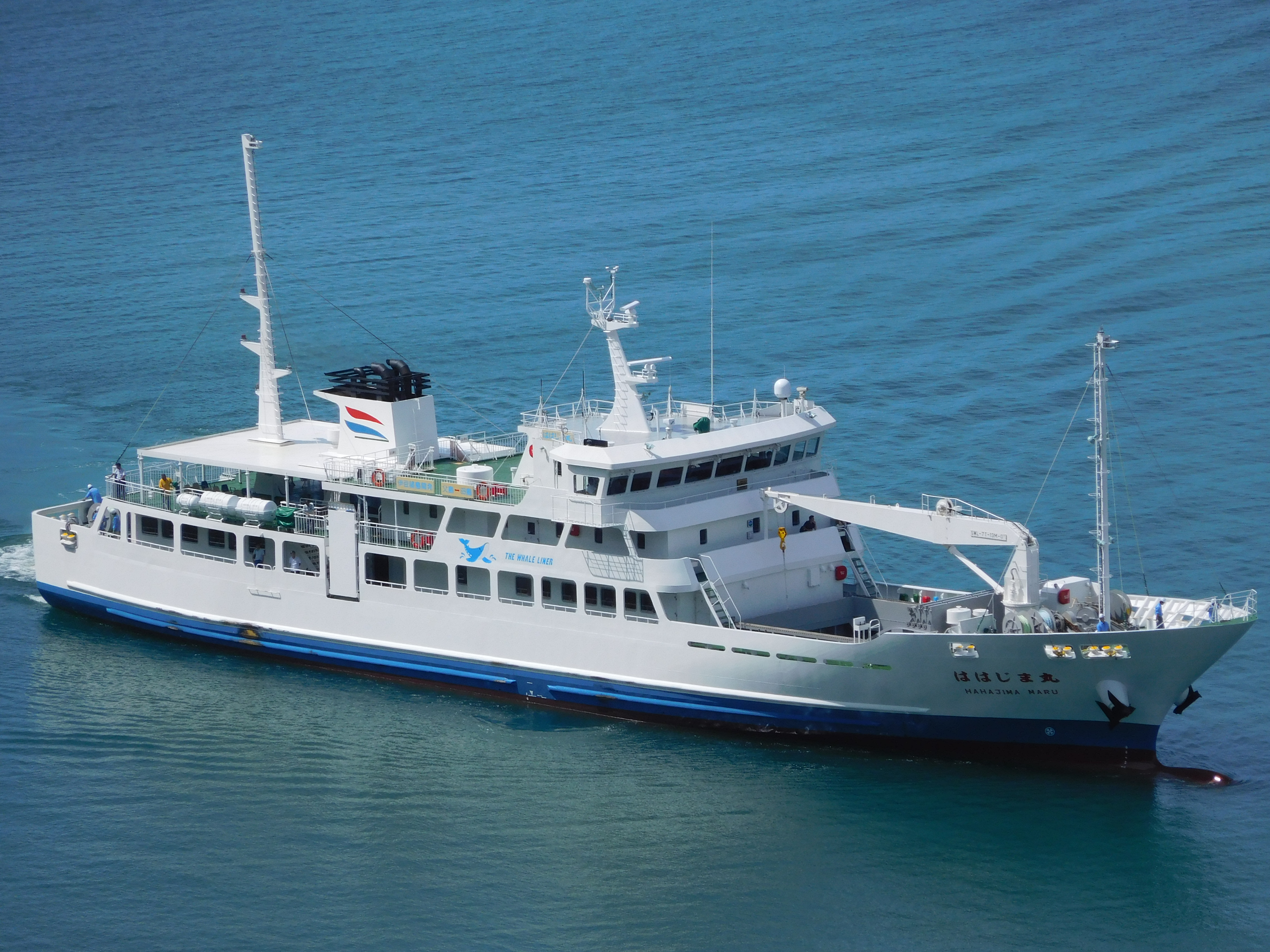 ３代目ははじま丸 航行中を母島の小剣崎山より20160917に撮影